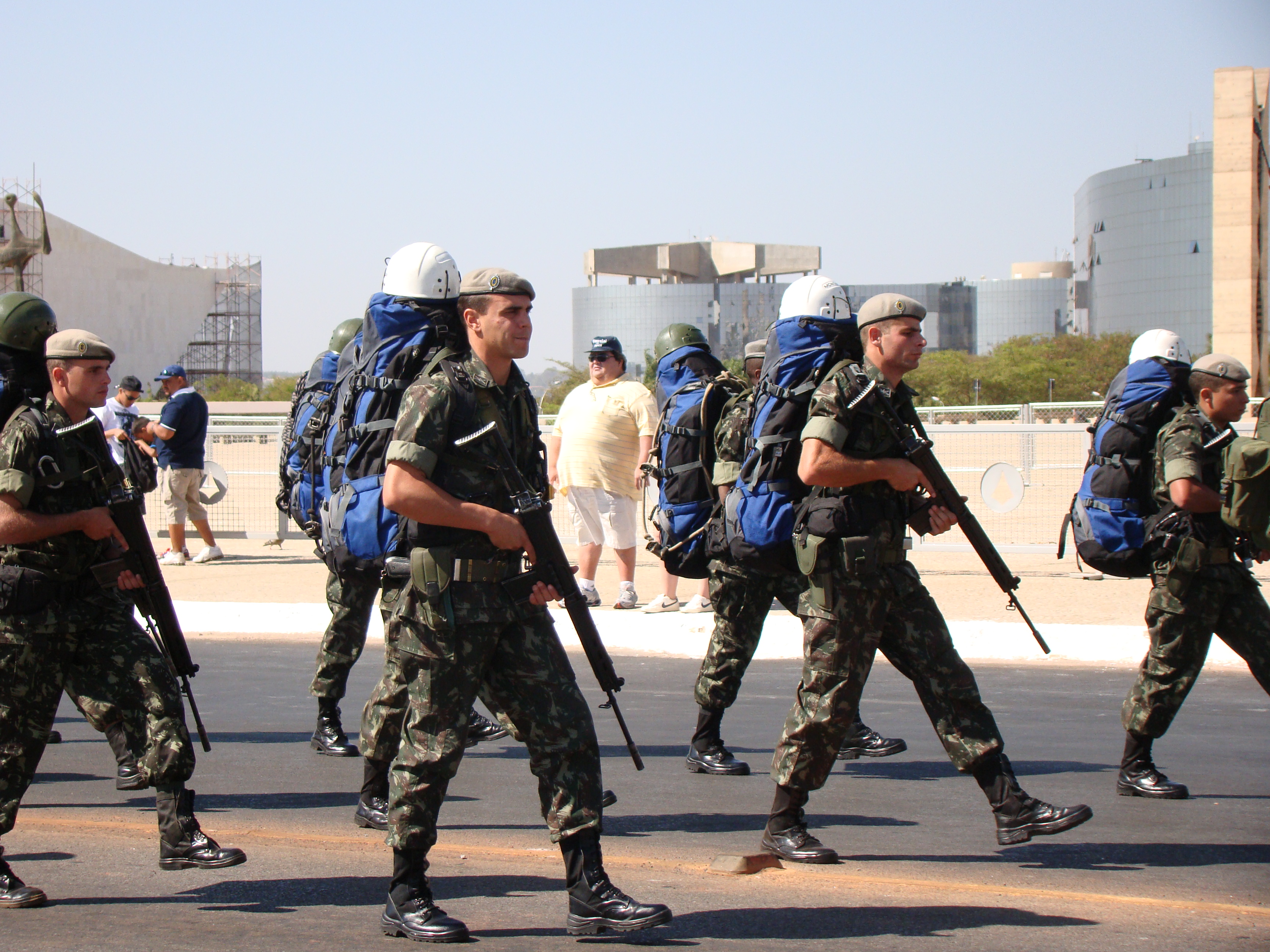 11º Batalhão de Infantaria de Montanha